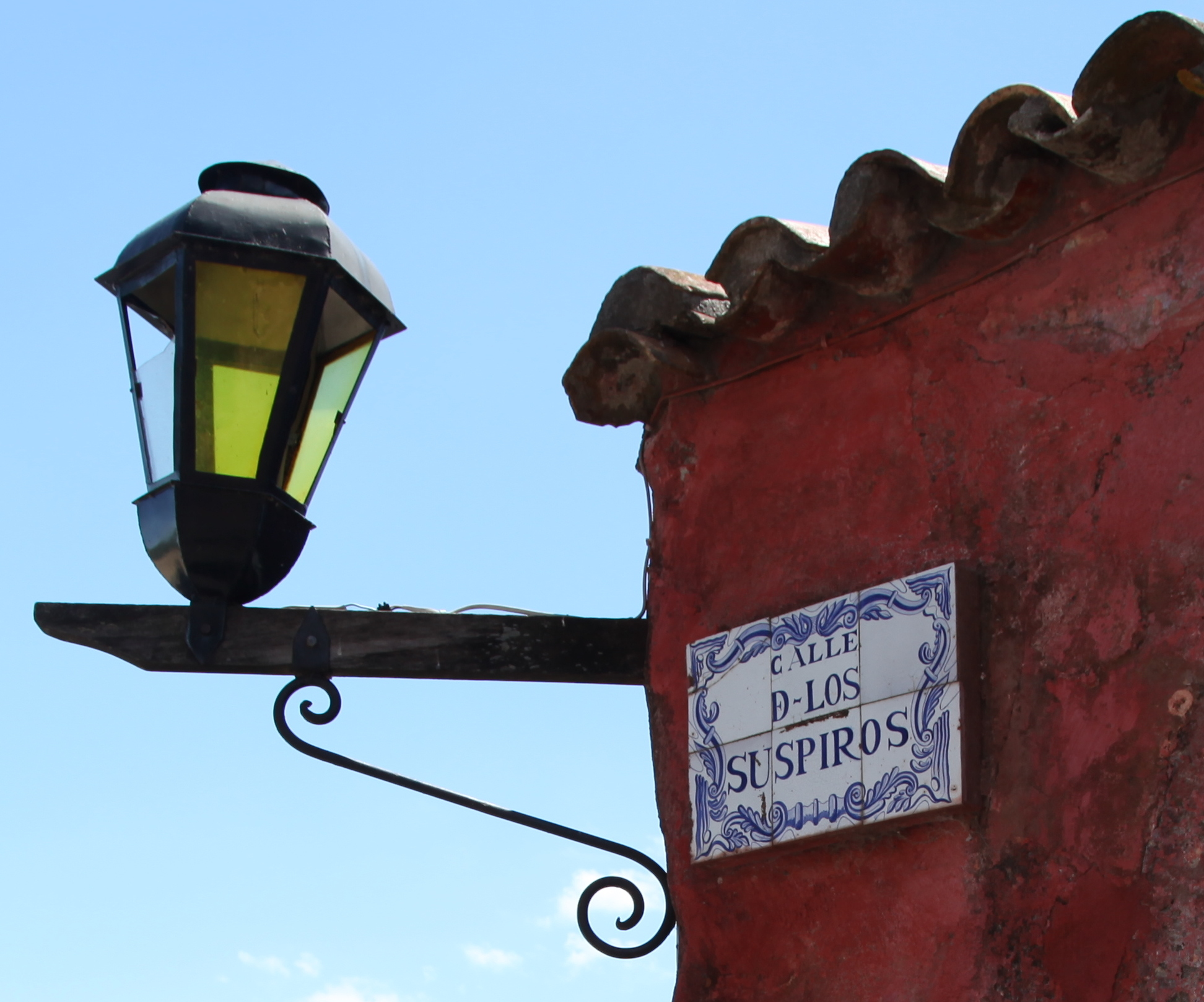 Colonia del Sacramento, Uruguay